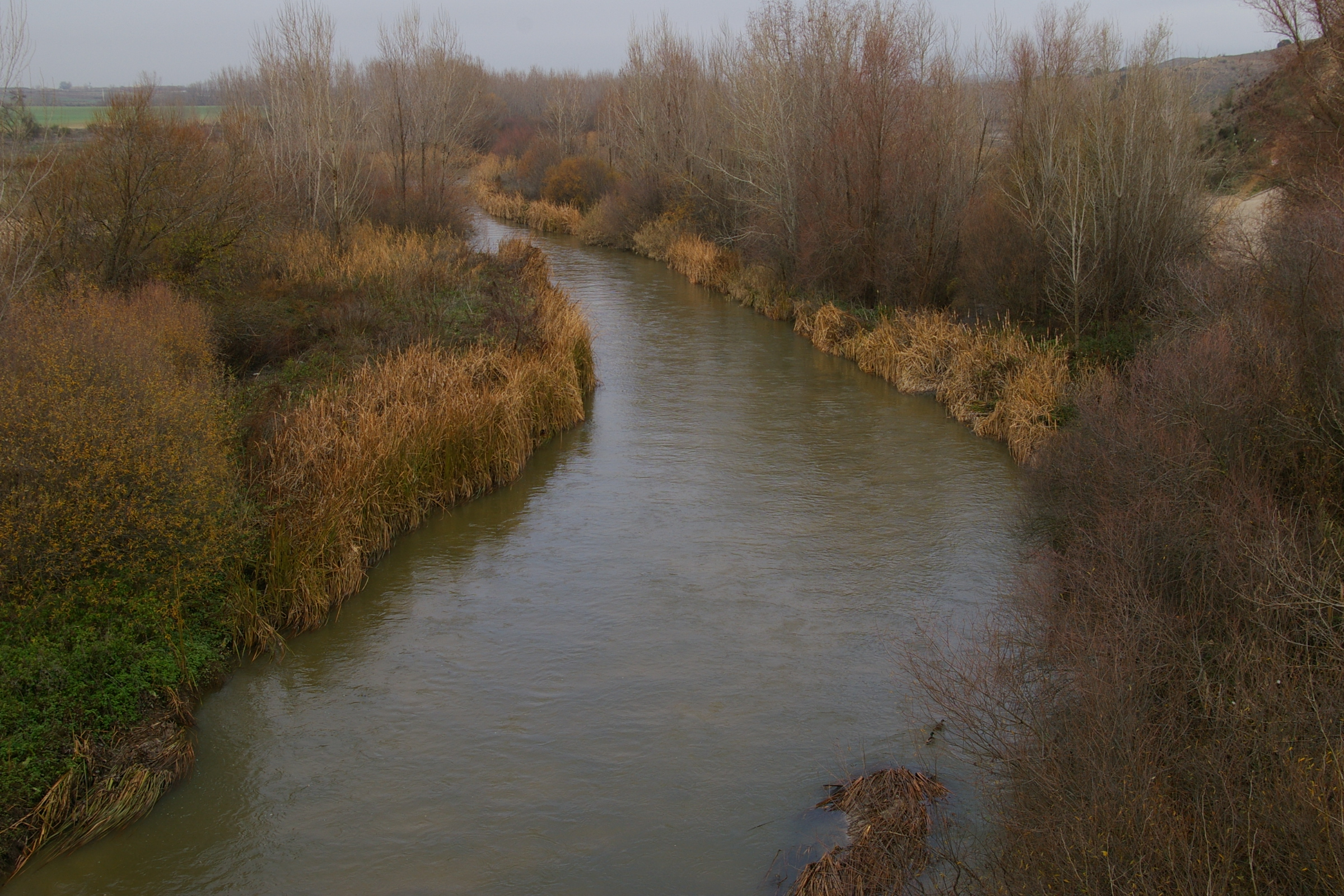 Carranque